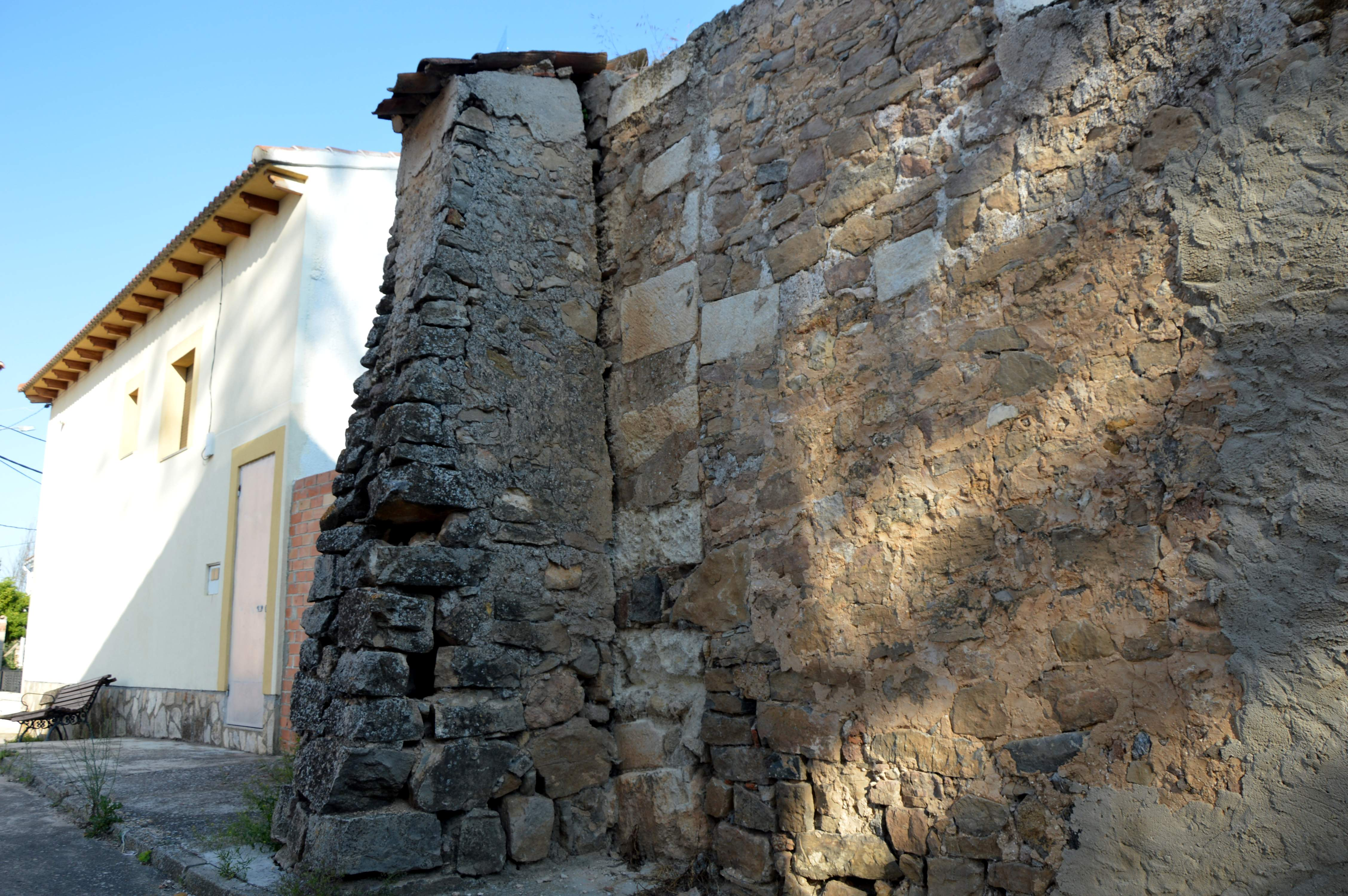 Detalle de muros y contrafuerte de la iglesia conventual, únicos restos materiales del monasterio de las Recoletas Bernardas de Santo Domingo de Moya, Cuenca (2017).